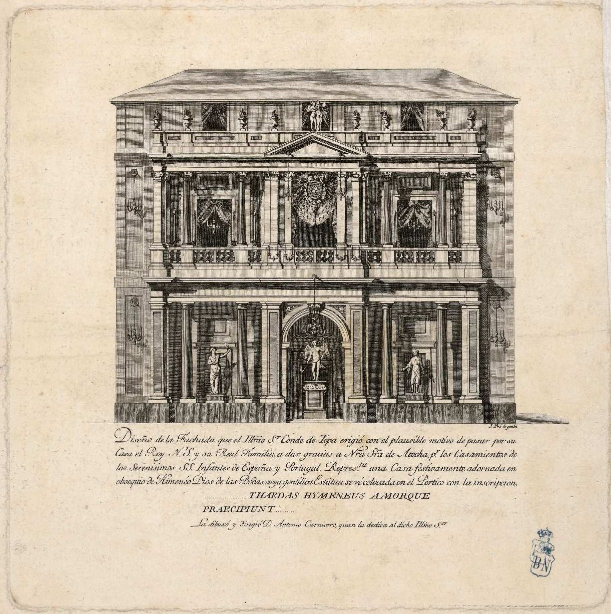 Diseño de la Fachada que el Ilmo. Sr. Conde de Tepa erigió con el plausible motivo de pasar por su Casa el Rey N.S. y su Real familia a dar gracias a Nra. Sra de Atocha pr los Casamientos de los Serenísmos SS Infantes de España y Portugal. Representa una Casa festivamente adornada en obsequio de Himeneo Dios de la Bodas, cuya gentílica Estatua se ve colocada en el Pórtico... Lo dibuxó y dirigió D. Antonio Carnicero... J. Pro lo grabó. Biblioteca Nacional de España